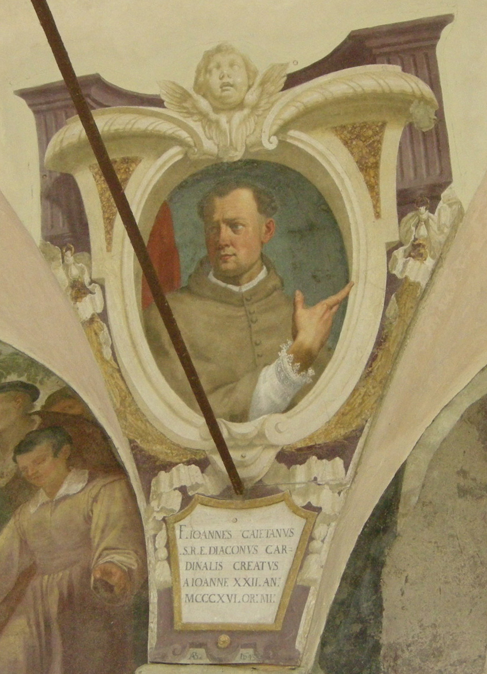 Chiostro di ognissanti, personalità francescane 17 Giovanni Gaetano Orsini